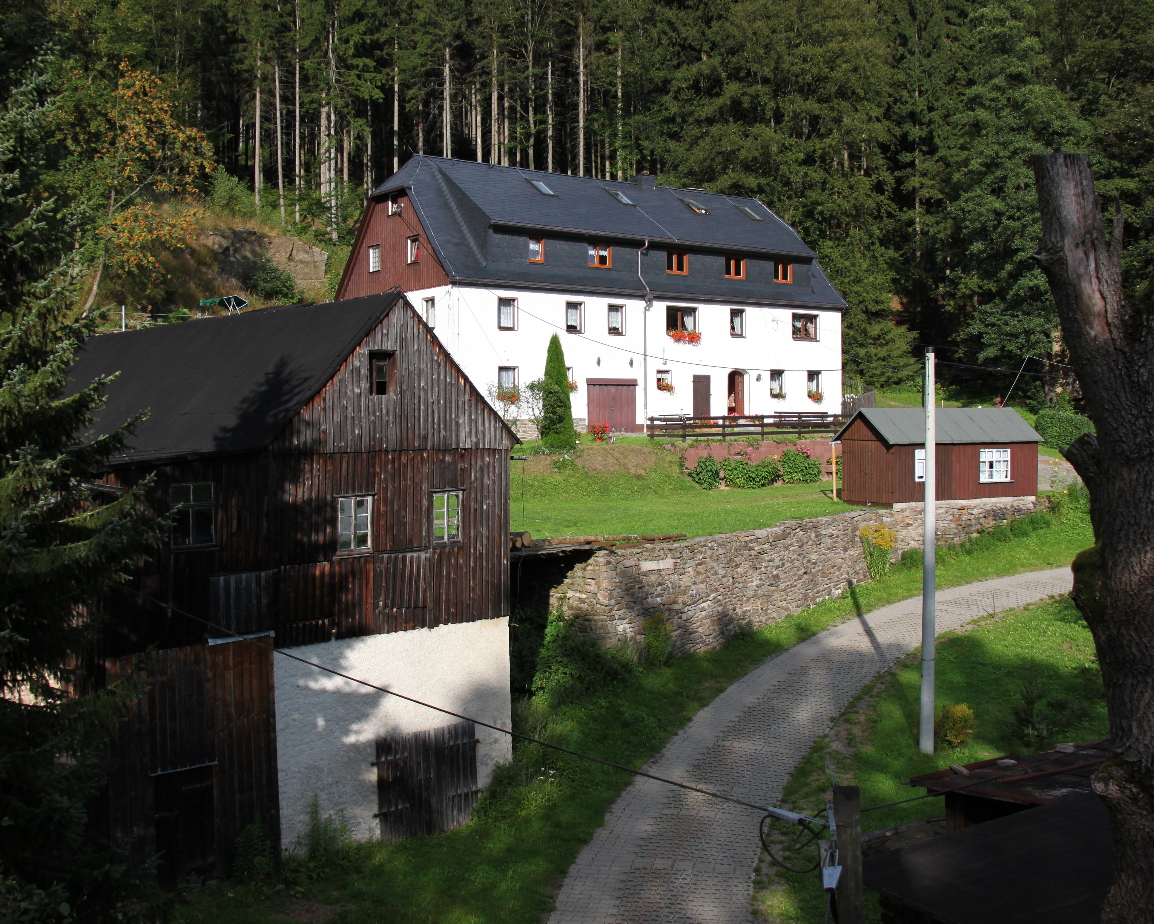 Das ehemalige Sägewerk Neubert in Mittelschmiedeberg